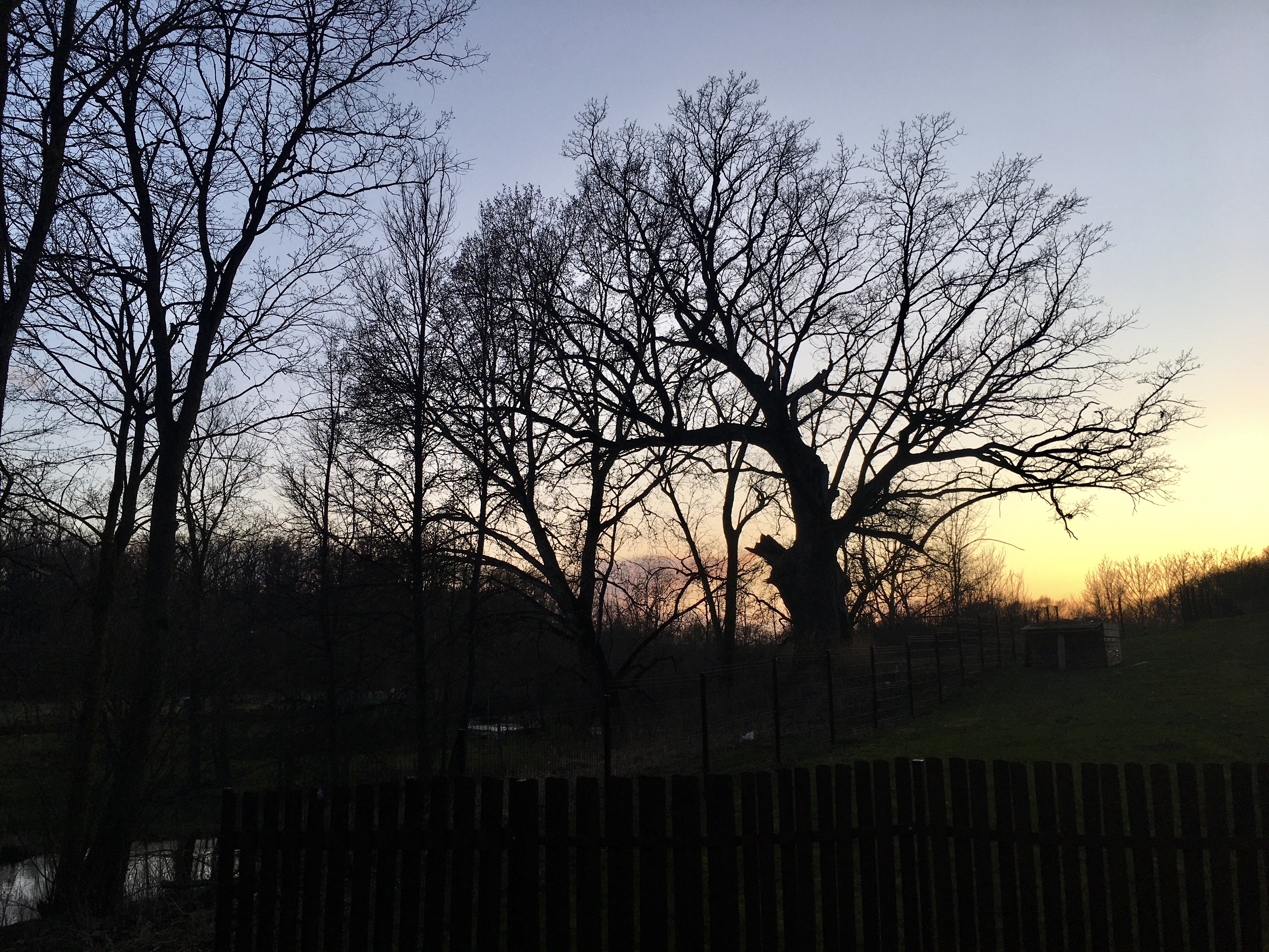 Nuotrauka daryta 2020-04-03